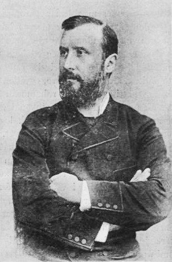 báró Eötvös Loránd portréja. Ellinger Ede fényképfelvétele